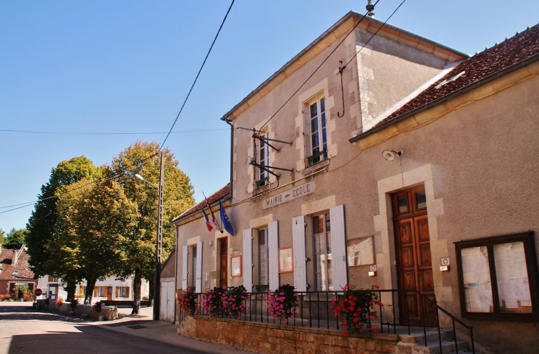 La Mairie